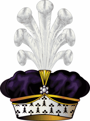 Duke of Empire / książę cesarstwa